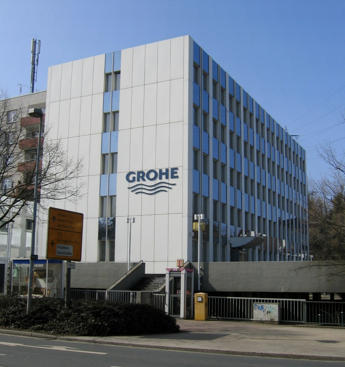 Description: Verwaltungsgebäude der Firma Grohe, Hauptstraße 137 in Hemer. Source: selbst fotografiert Date: 19. März 2006 Author: Bubo